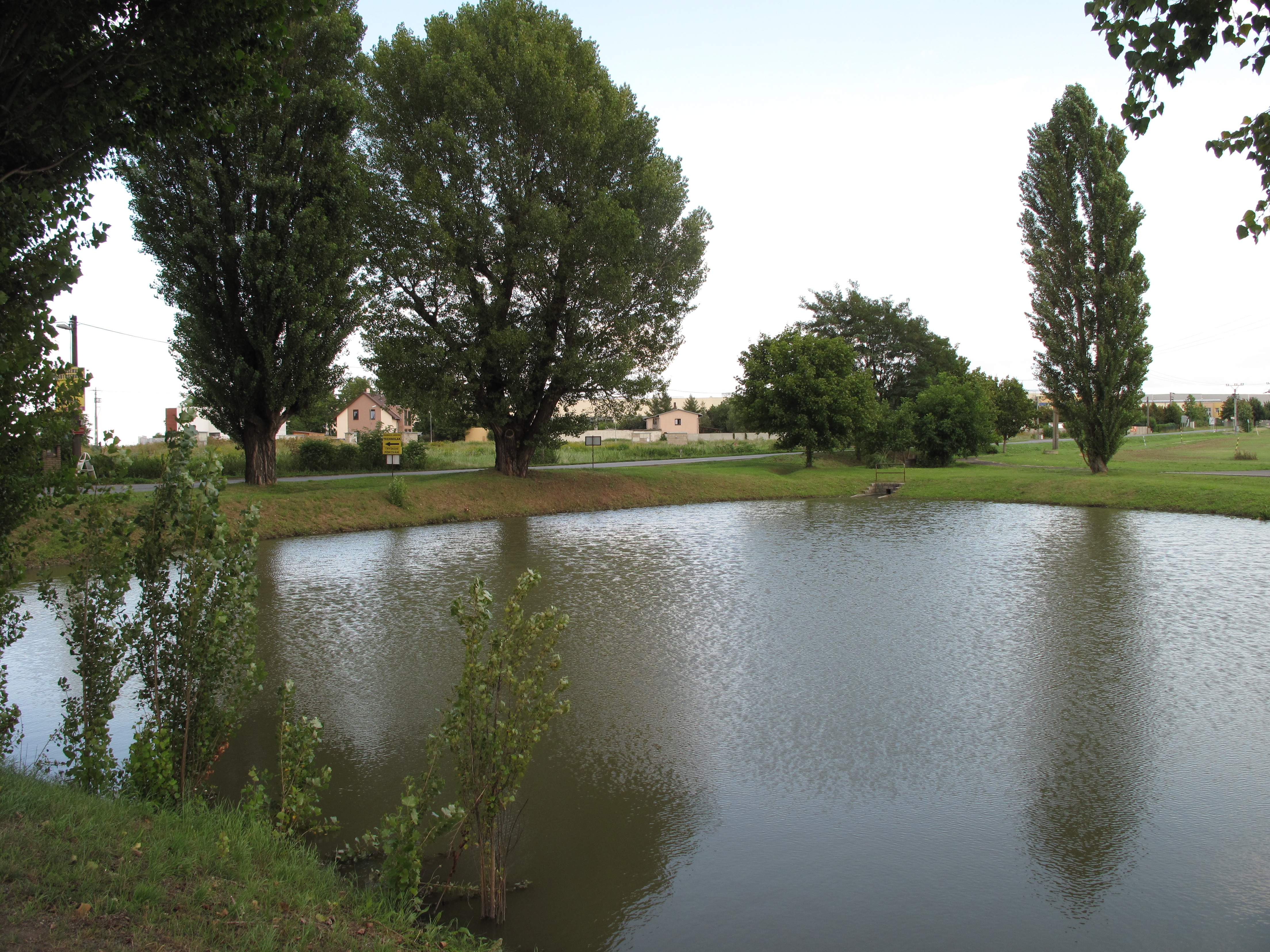 Nebeský rybník v Radonicích. Okres Praha-východ, Česká republika.